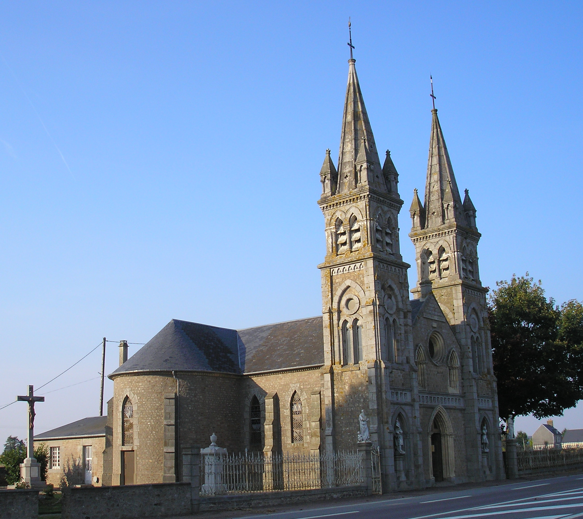 Le Reculey (Normandie, France). La chapelle Notre-Dame-du-Bocage.